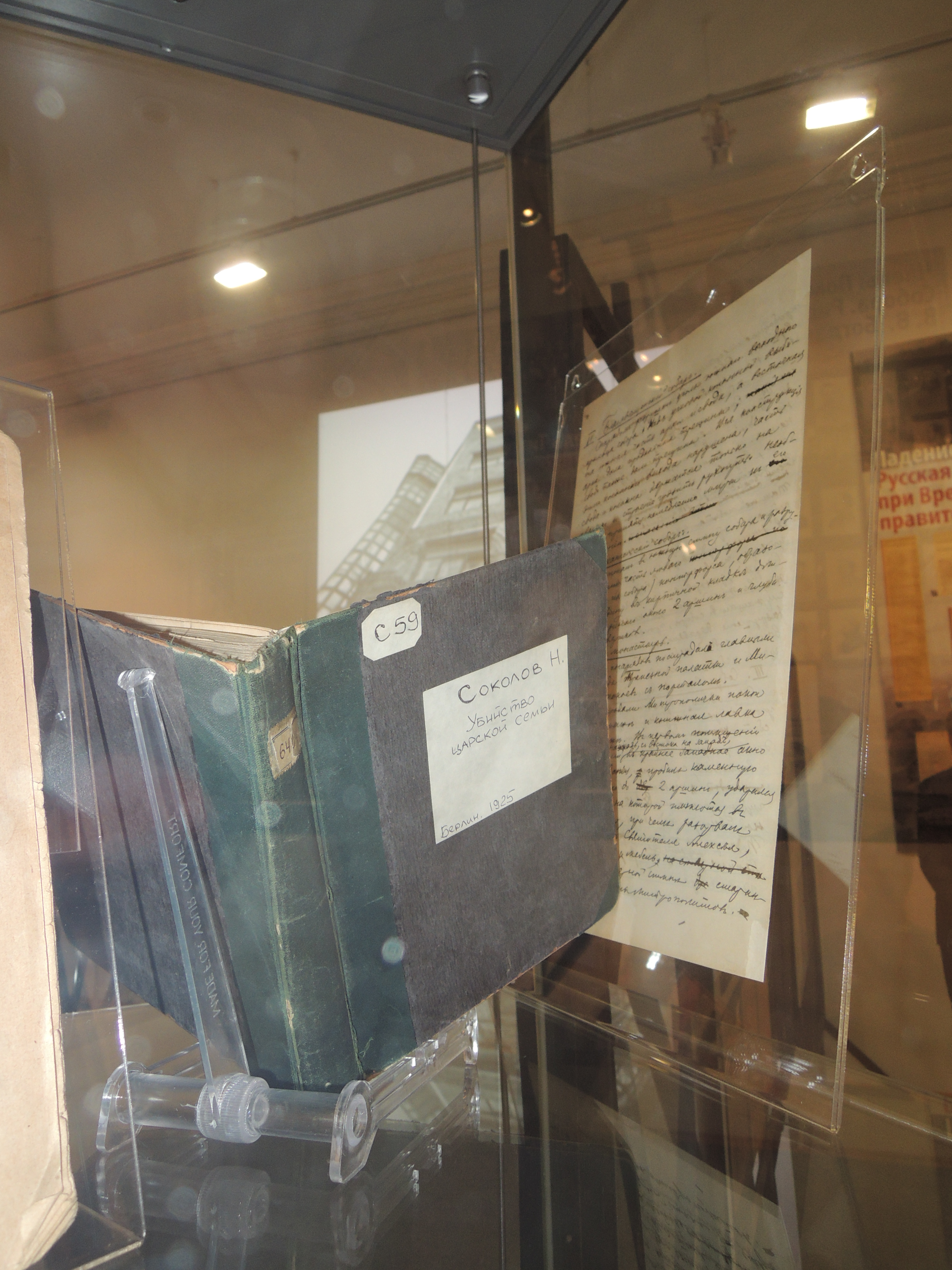 Том материалов предварительного следствия Н.А. Соколова об убийстве царской семьи. 1925, Берлин